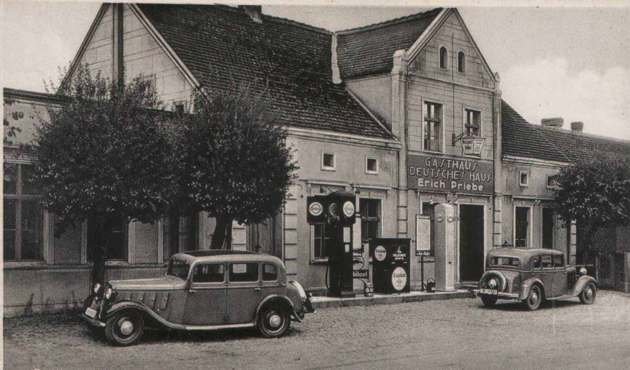 Szwecja - gościniec i stacja benzynowa. 1943